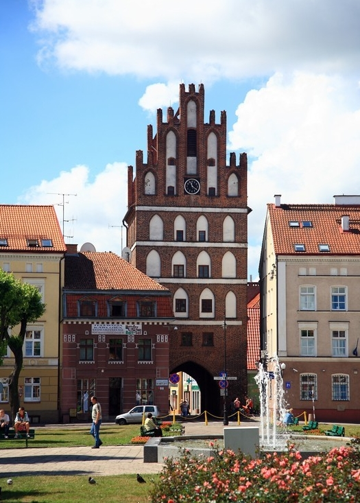 Bartoszyce, pl. Konstytucji 3 Maja 22 - brama miejska „Lidzbarska”